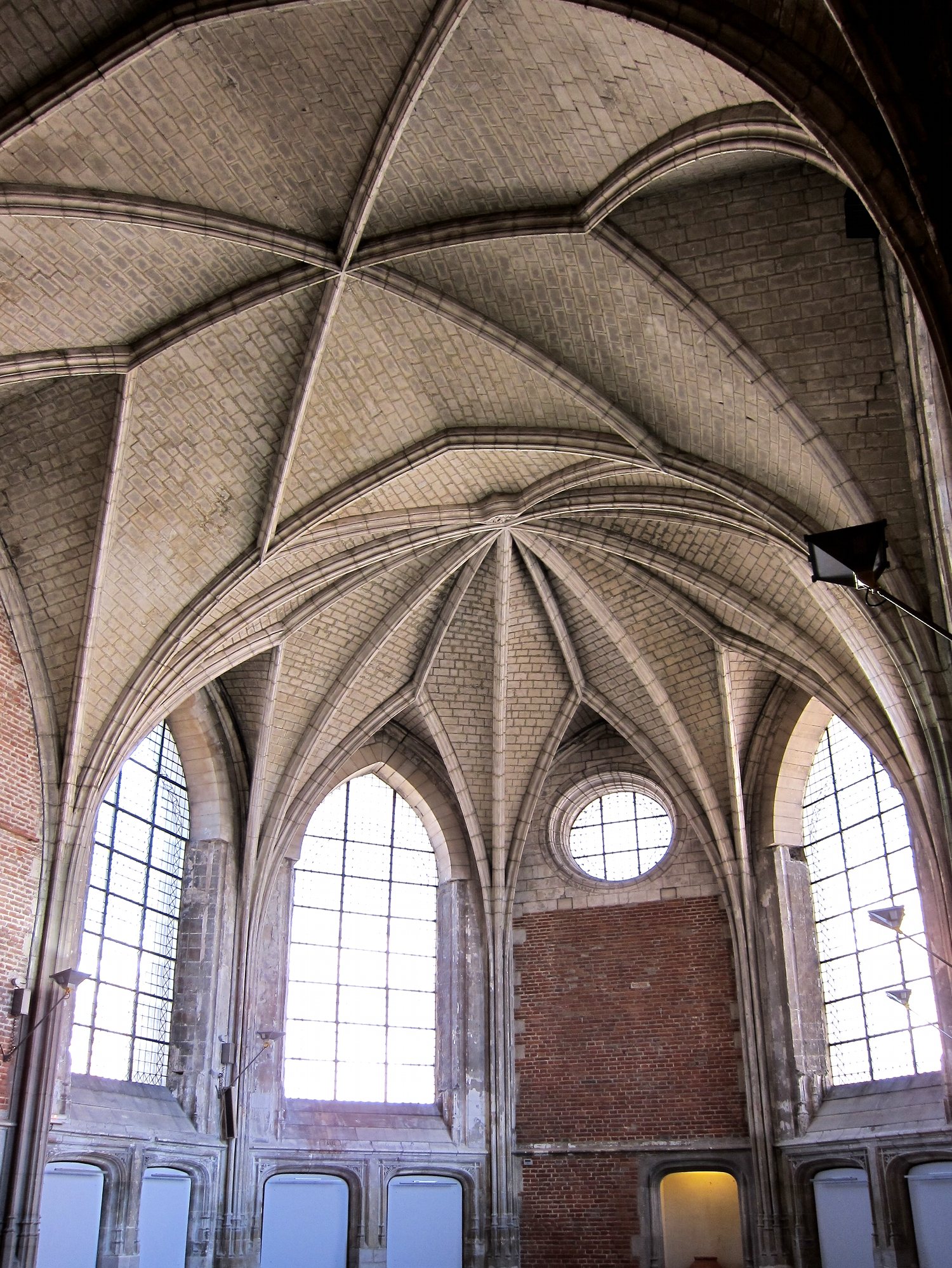 La salle du conclave du Palais Rihour à Lille (Nord).